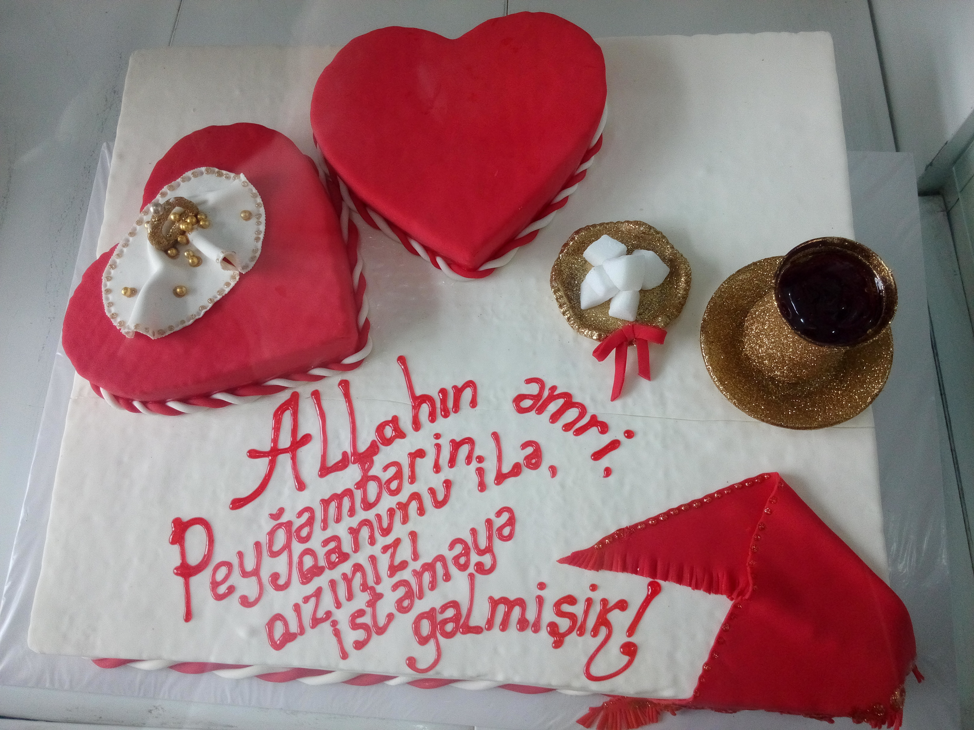 Elçilik tortu